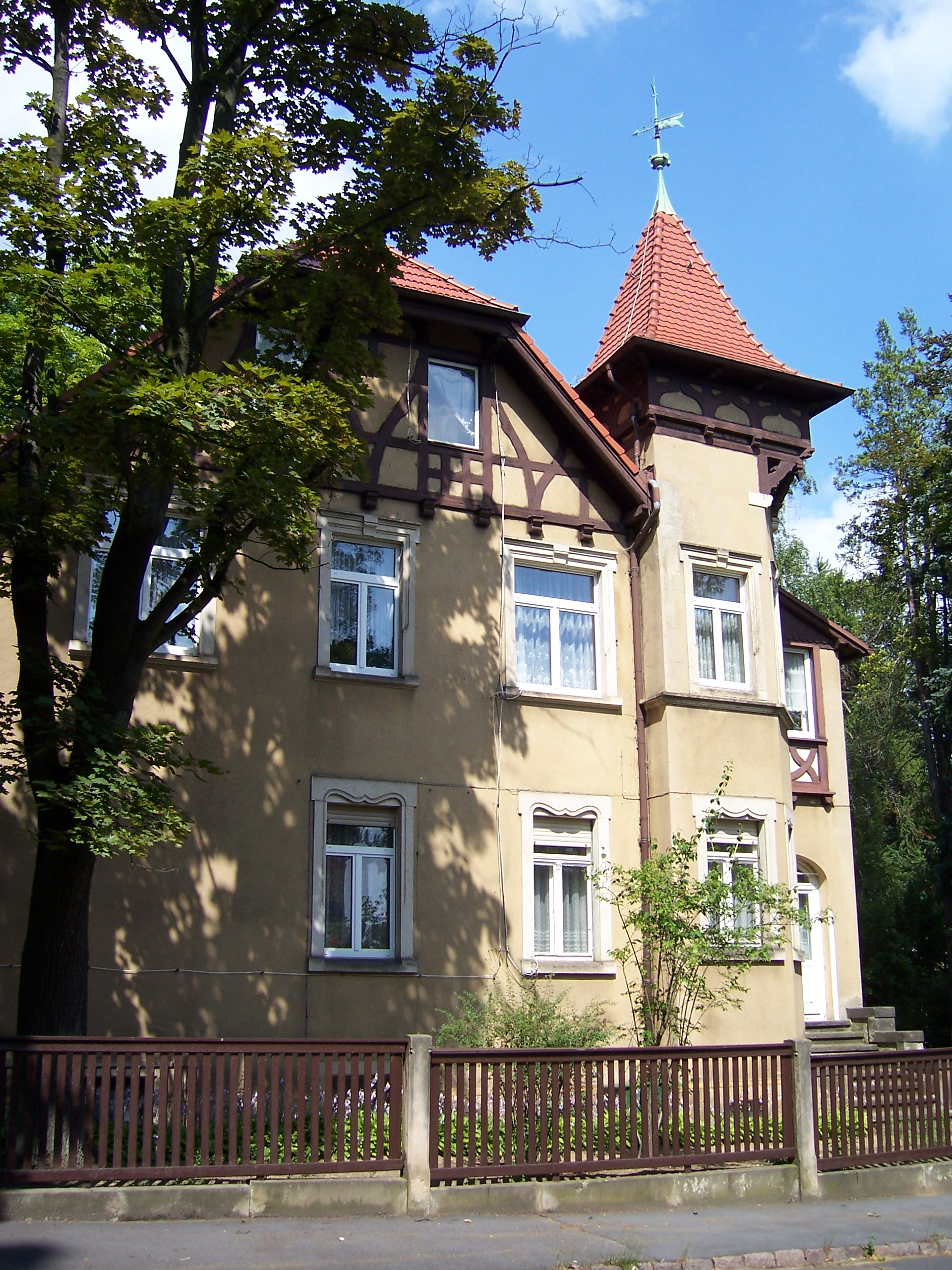 Villa Baldur in Dresden-Klotzsche, 1918-1919 im Besitz des Literaturnobelpreisträgers Karl Gjellerup.